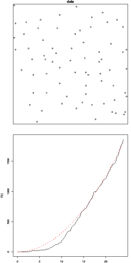 Esimerkki pisteprosessin ja K-funktion estimaatille. Tuomas Rajala